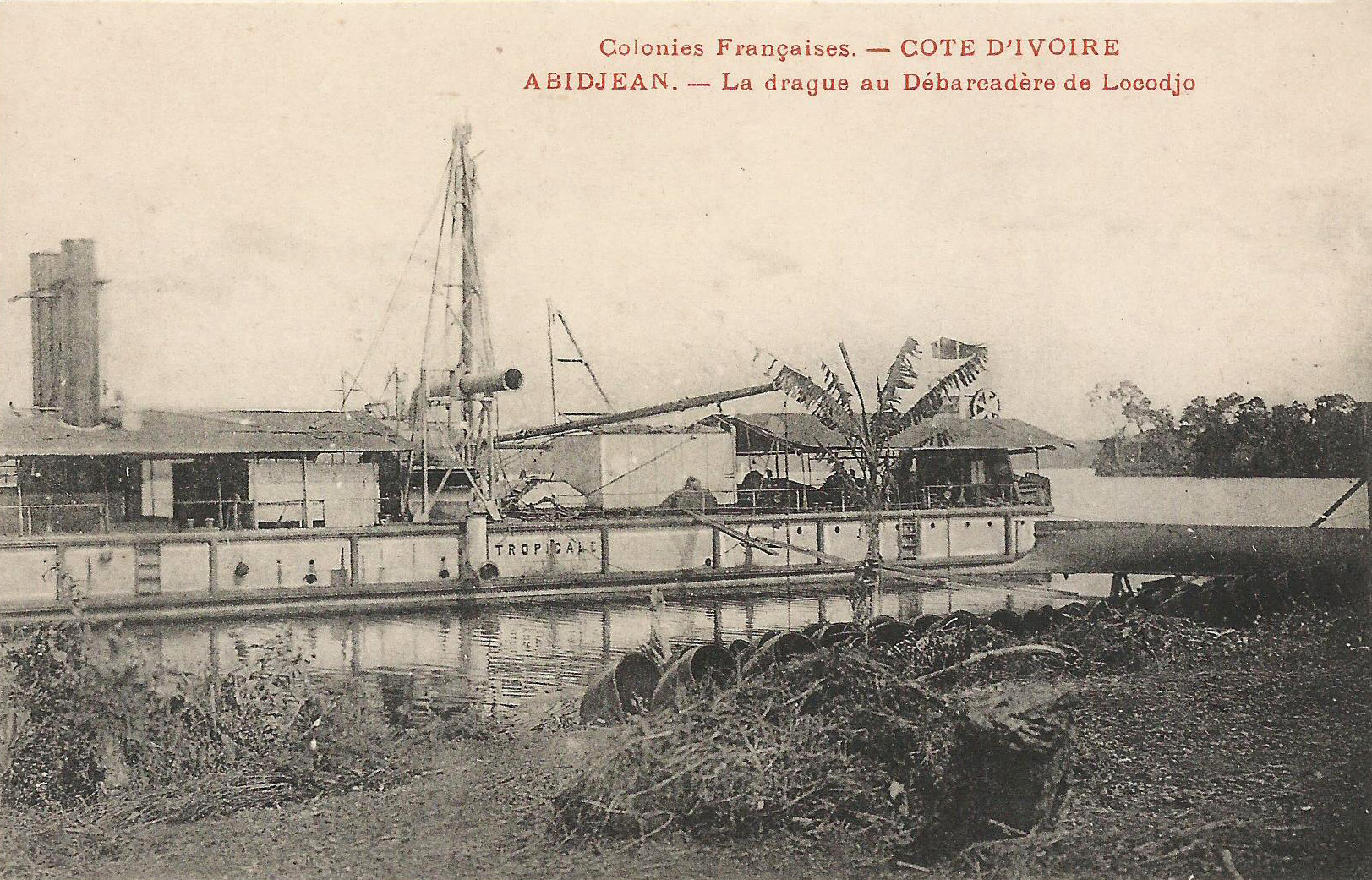 Carte postale ancienne. Colonies françaises. Côte d'Ivoire. Abidjan. La drague au débarcadère de Locodjo. Sans mention d'auteur, d'éditeur, de date, ni au recto ni au verso.. Cependant la date peut être estimée entre 1892 et 1920 (cf. .Images, mémoires et savoirs: une histoire en partage avec Bogumil Koss, p. 310.)